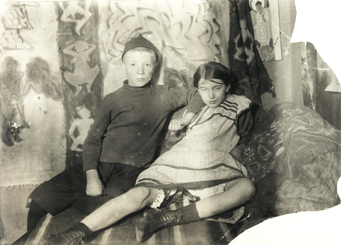 Fränzi Fehrmann, Modell der „Brücke“-Künstler, und Peter